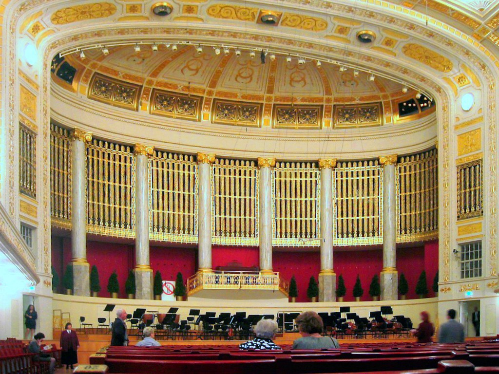 Wien, Austria: Wiener Konzerthaus, Großer Saal